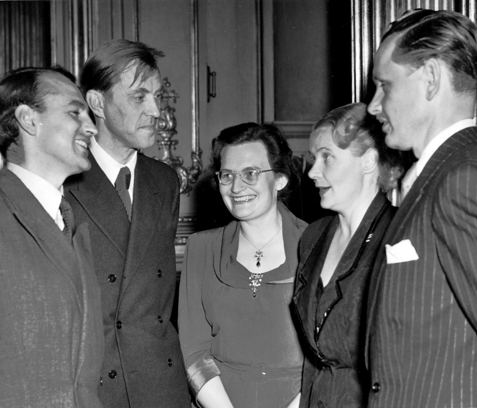 Fil.lic. Edmund Dahlström, arkitekt Sune Lindström, doktor Viveka Lagerkrantz, fru Alva Myrdal och arkitekt Göran Sidenbladh. Ja, detta var några av de synpunkter som kom fram vid Yrkeskvinnornas första klubbafton för säsongen, vars diskussionsprogram fått den tillspetsade formuleringen "Leva och dö kring Stureplan eller i Söderort". Inledare var arkitekterna Sune Lindström och Göran Sidenbladh samt sociologen fil.lic. Edmund Dahlström och ämnet hade lockat en talrik församling till Grands spegelsal.